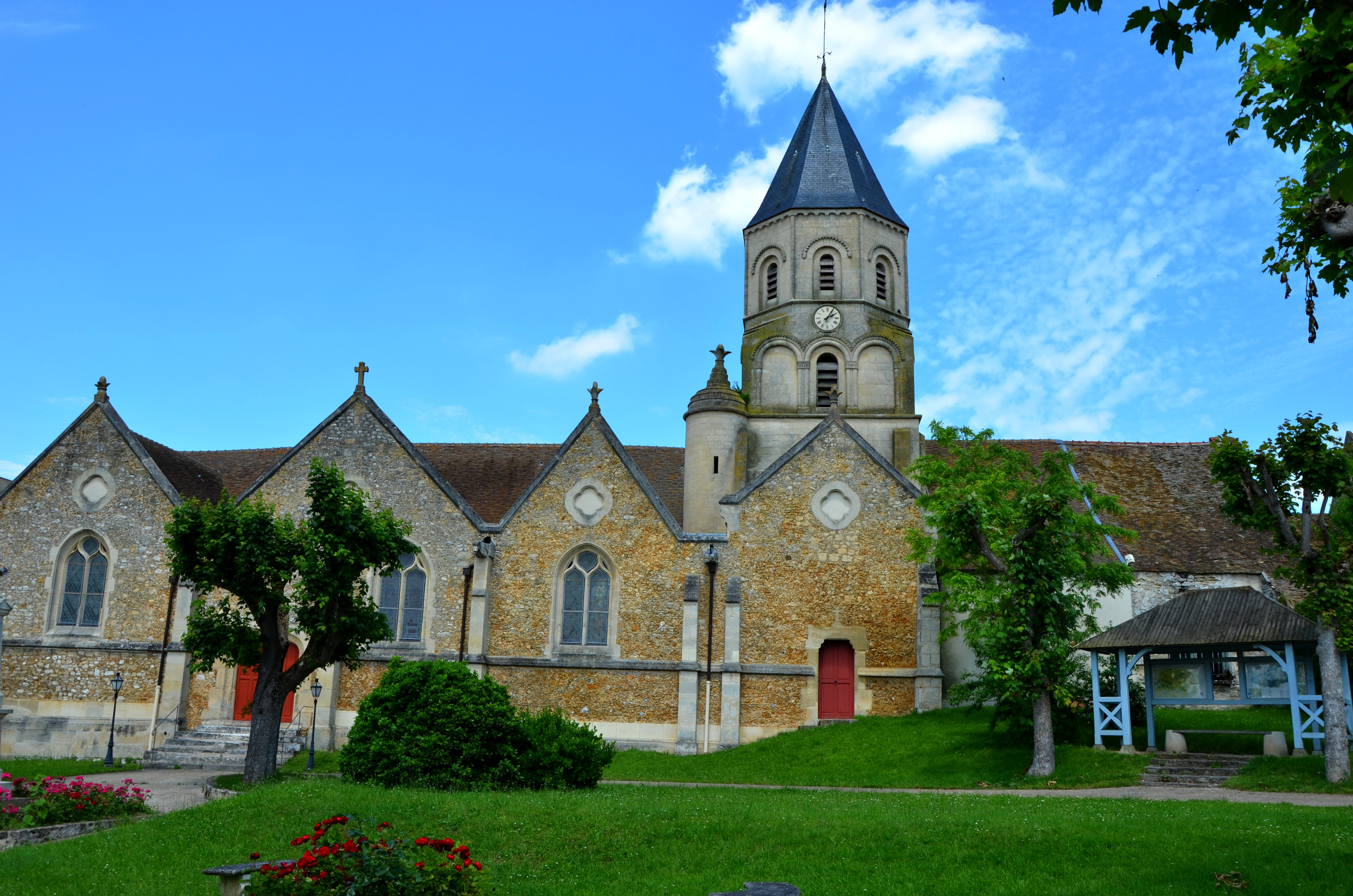 église saint-martin la garenne